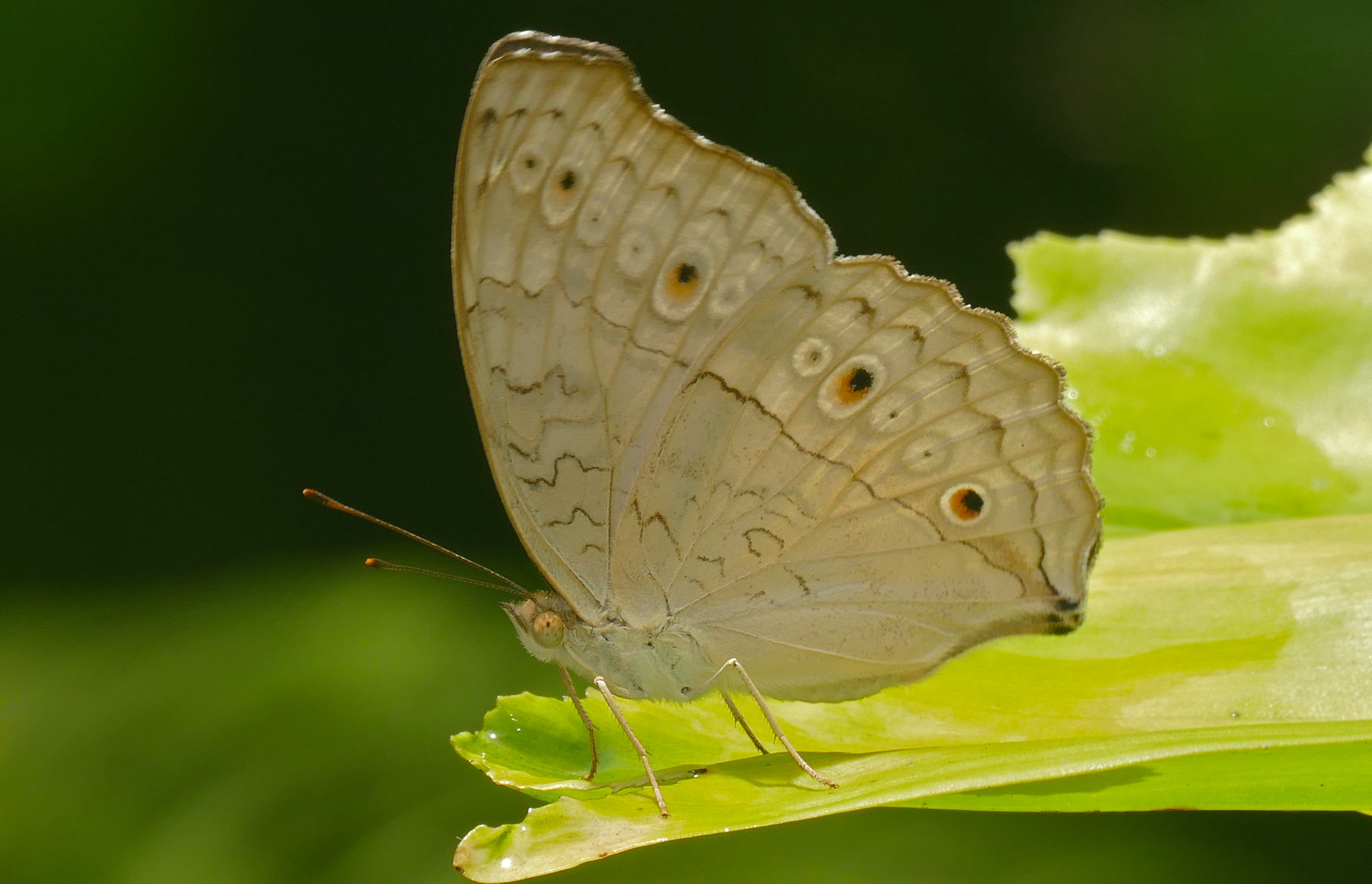 Mulu NP, Sarawak, MALAYSIA